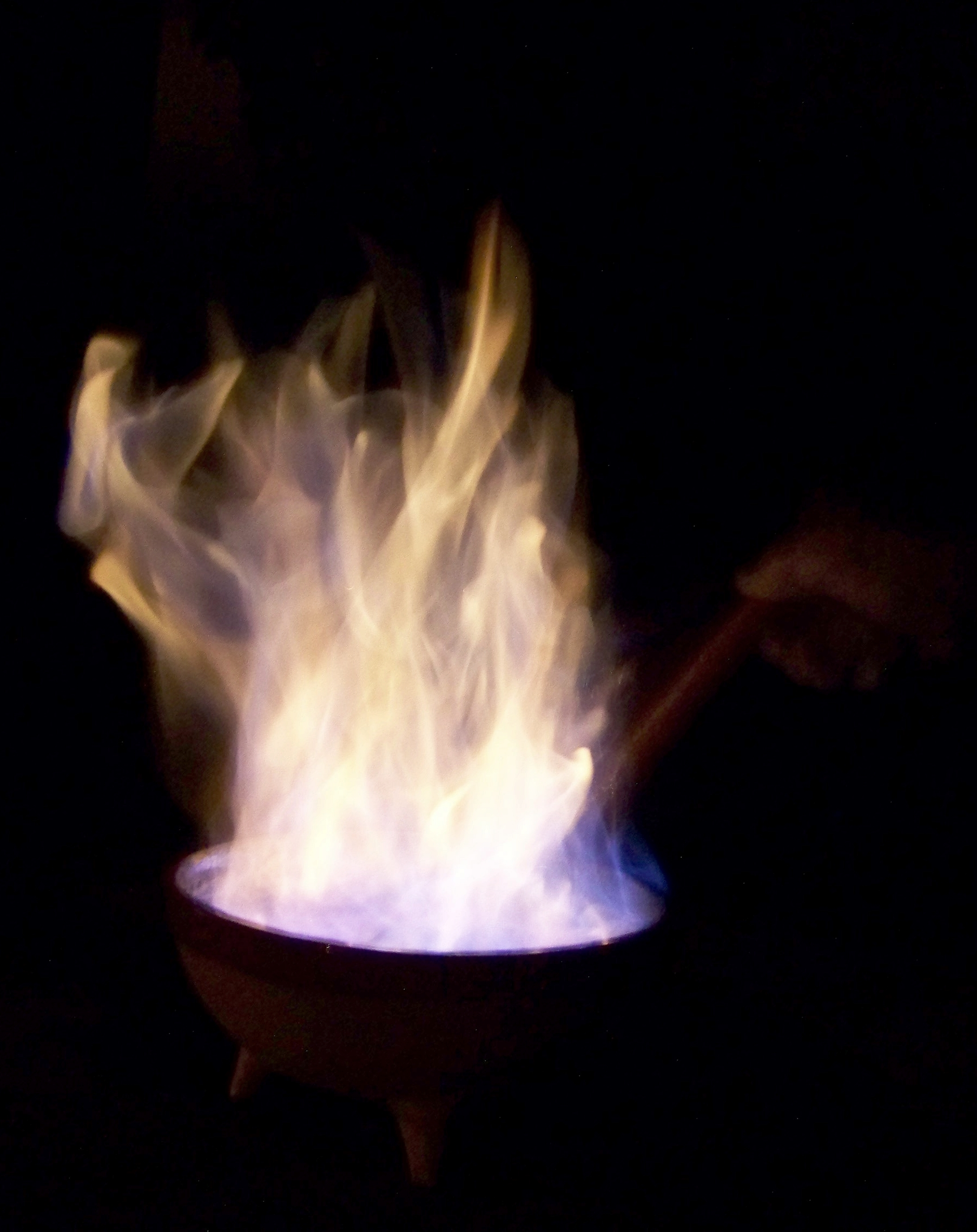 Queimada